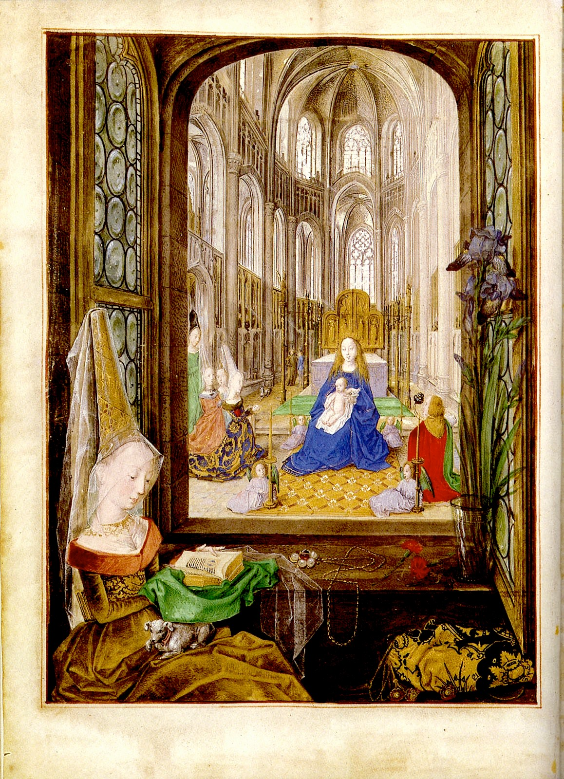 Wien, Österreichische Nationalbibliothek, cod. 1857, Stundenbuch der Maria von Burgund. In: Franz Unterkirchner (Hrsg.): Das Stundenbuch der Maria von Burgund. Codex Vindobonensis 1857 der Österreichischen Nationalbibliothek (Glanzlichter der Buchkunst), Darmstadt 1993.